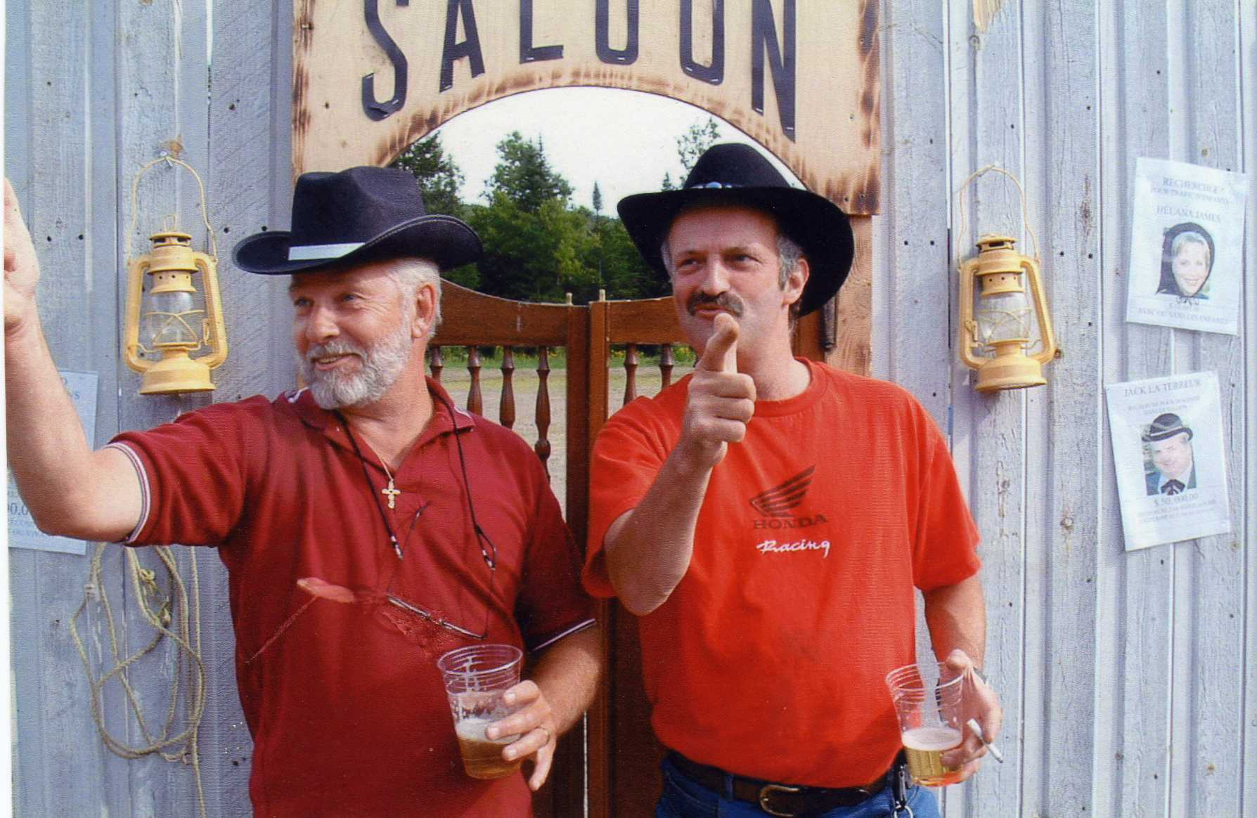 Festival annuel Western Stoneham à Stoneham Qc Canada